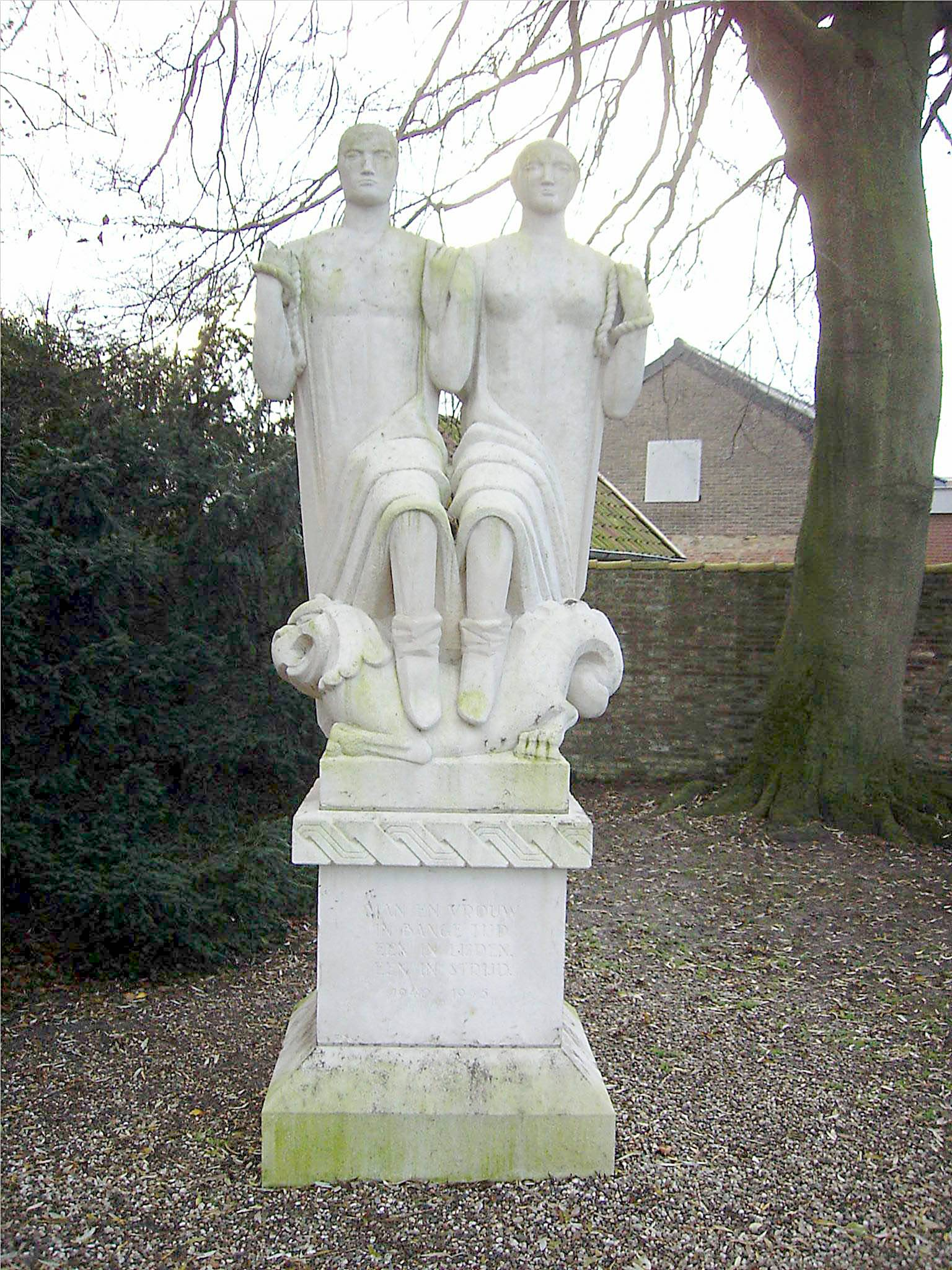 Jan van Luijn,1952